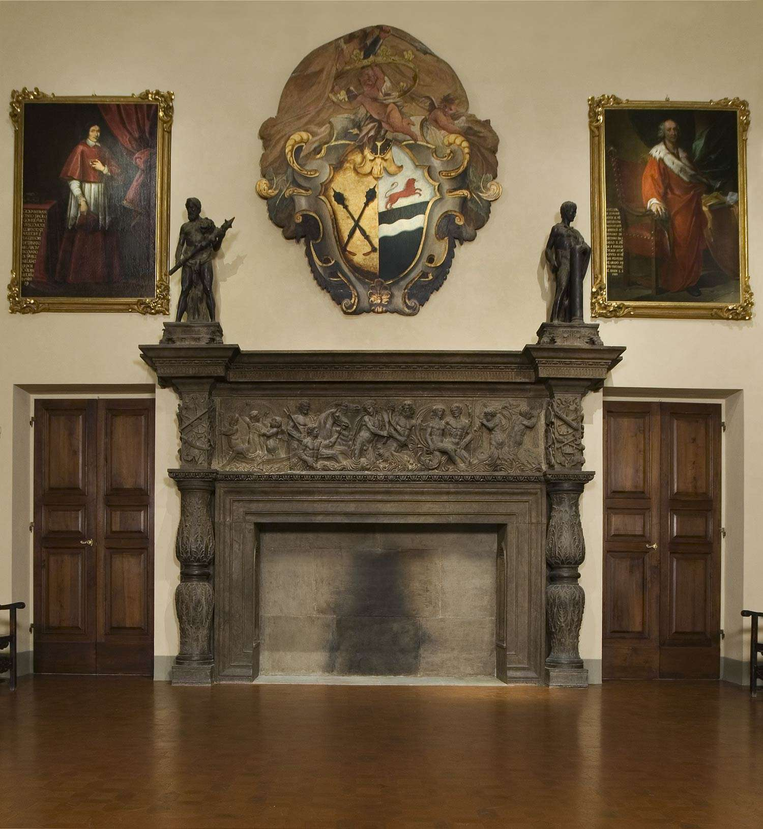 Il camino monumentale del salone di Palazzo Gondi